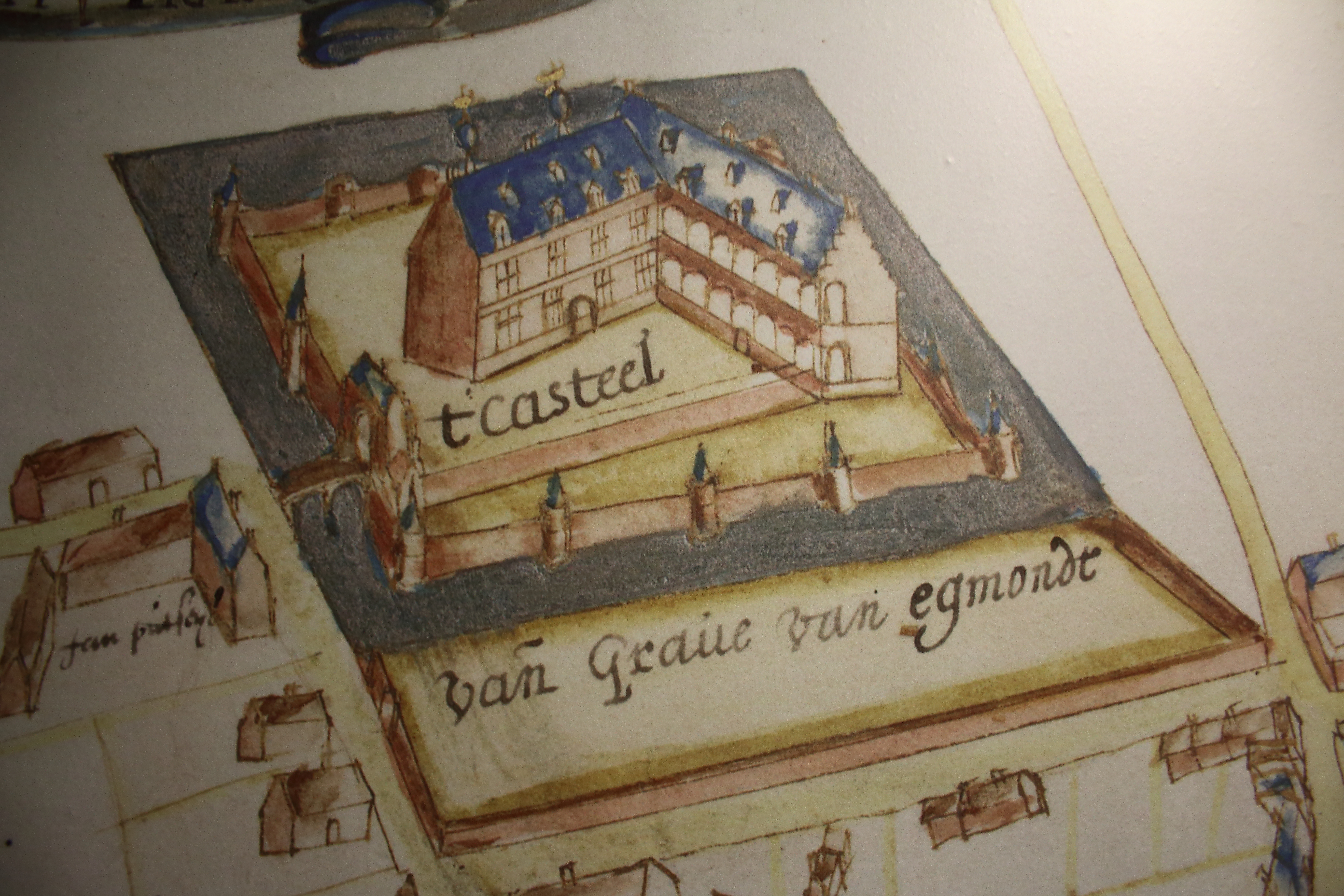 Egmontkasteel Zottegem ('t casteel van Grave van Egmonde'), kaart van de Vrijheid van Zottegem, Philips de Dijn, 1629 (Algemeen Rijksarchief Brussel) (reproductie op tentoonstelling 'Graven in vryheydt' Provinciaal Archeocentrum AVE Velzeke)